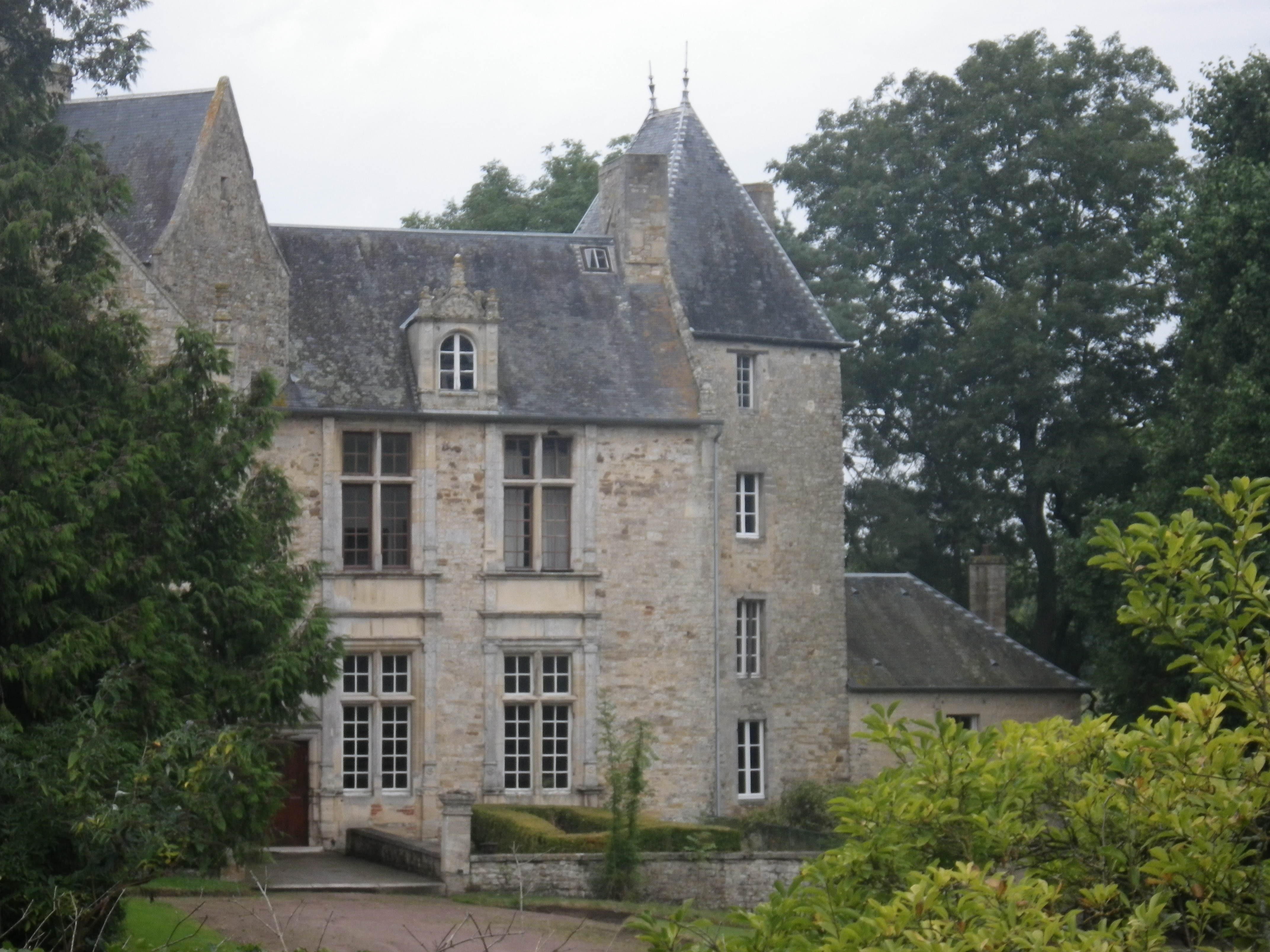 Château de Bernesq, actuellement Haras de Bernesq, Calvados .